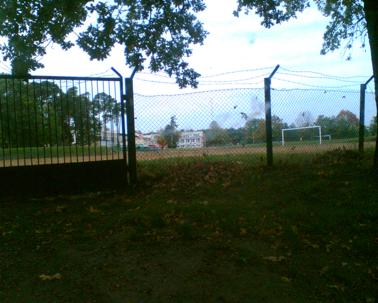 Boisko usytuowane przy zespole szkół, a w pobliżu KS Proch - widok od ulicy Fabrycznej